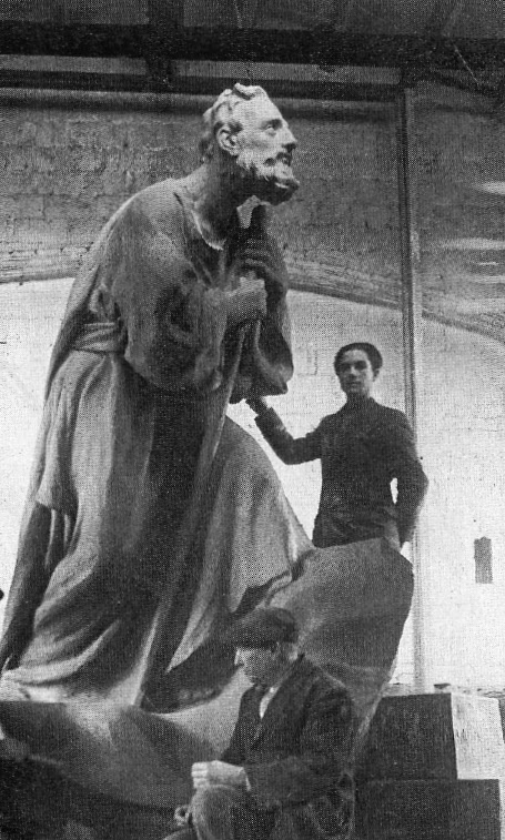 El escultor Joan Matamala junto a la figura de San José del grupo La Coronación de María.